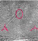 Daktiloskopia - Whorl